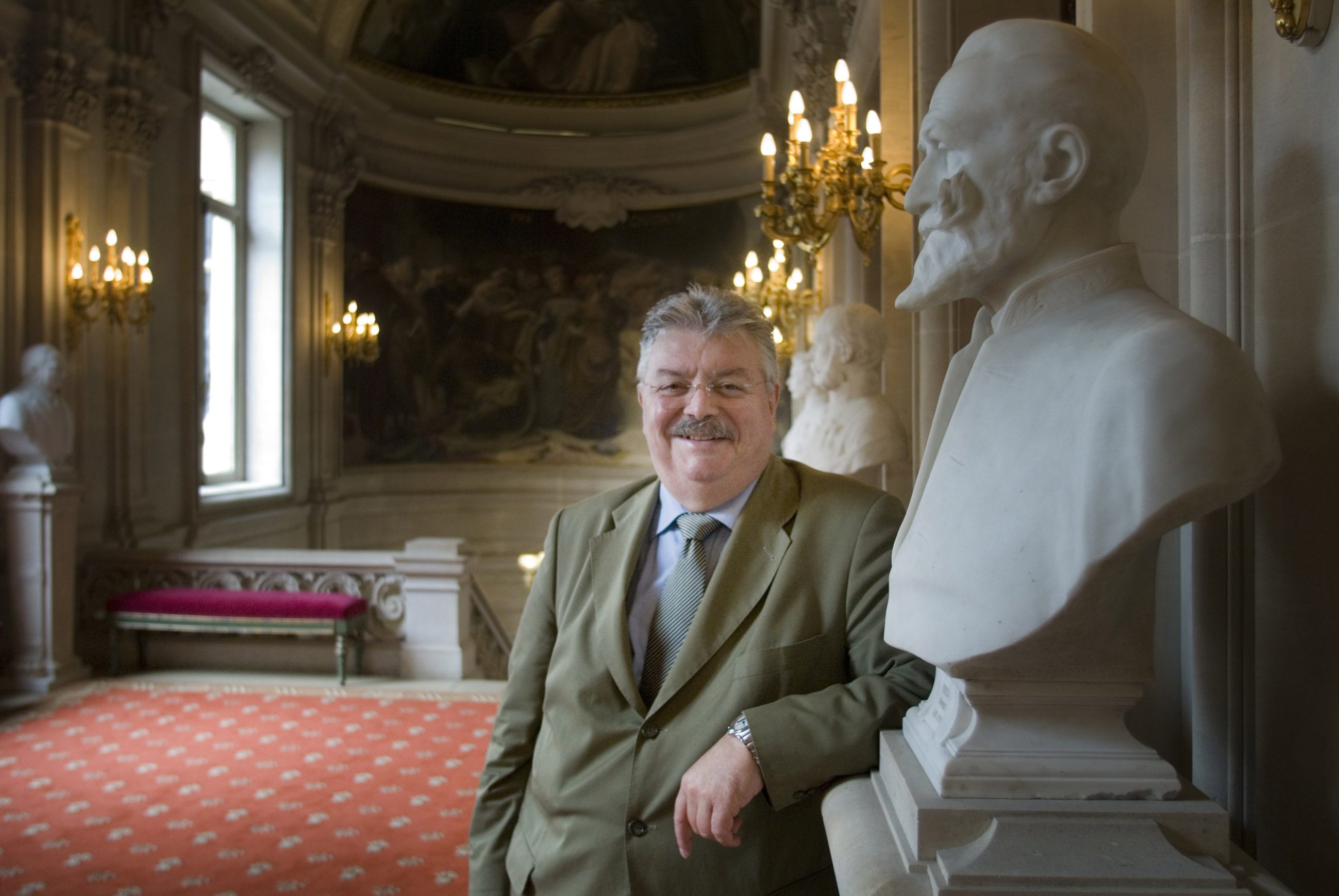 Freddy Thielemans, burgemeester van Brussel